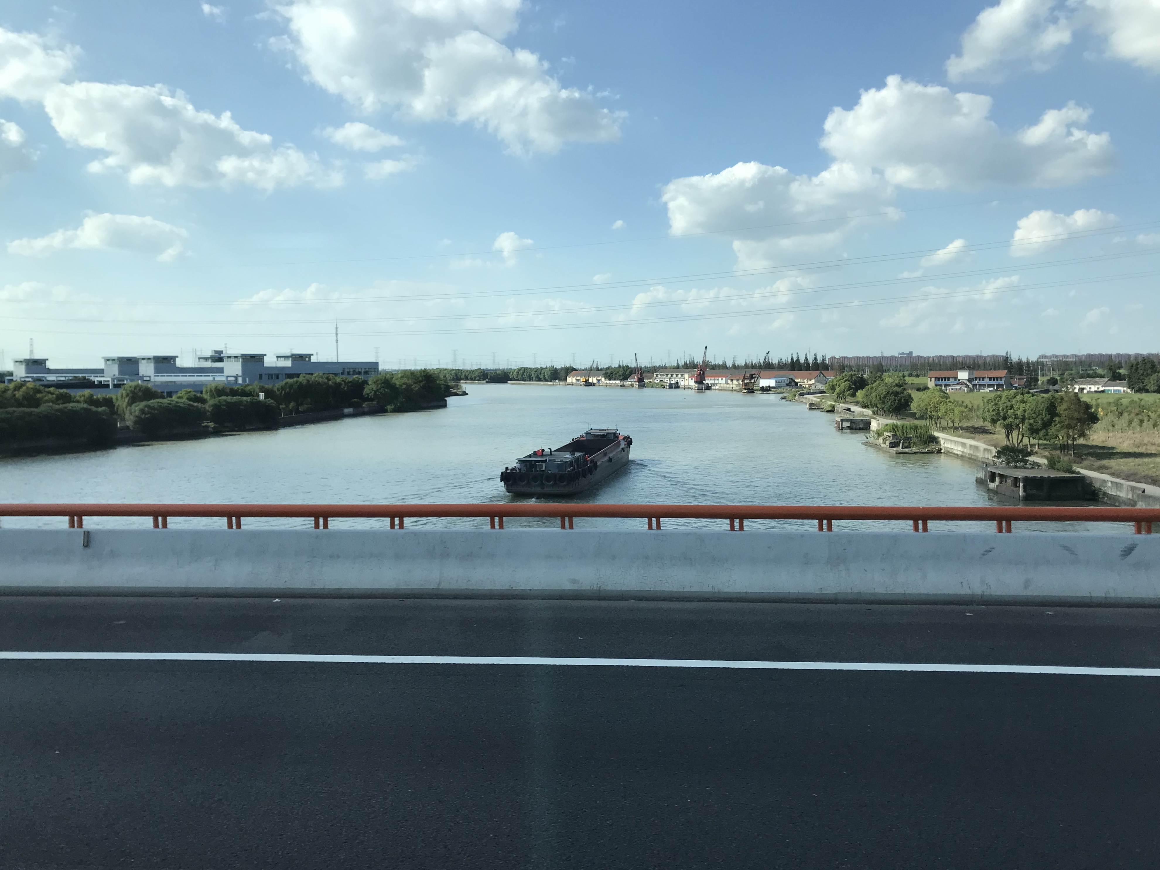 滬昆高速道路のバス車内より望む泖河(斜塘)